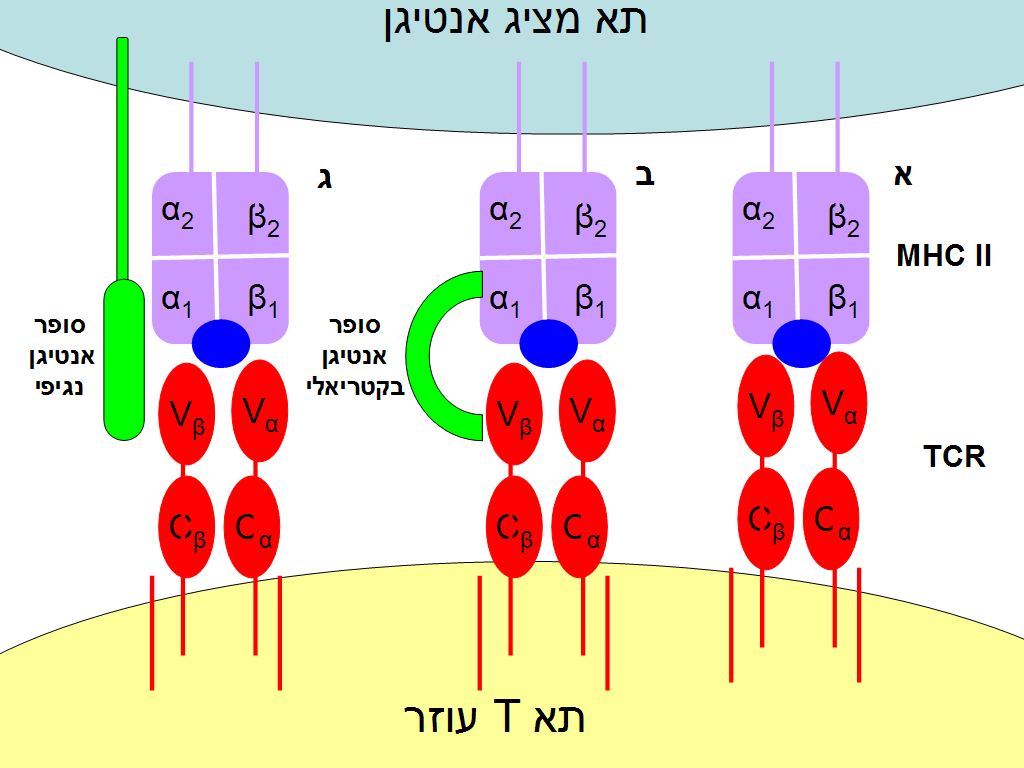 מנגנונים שונים להפעלת תאי T עוזרים על ידי מולקולת MHC סוג 2: א: קישור TCR למולקולת MHC סוג 2 אלוגנית- תא T מזהה באופן ספציפי תא מציג אנטיגן ובכך מפעיל בצורה יעילה אצ מערכת החיסון הנרכש. ב: קישור TCR למולקולת MHC סוג 2 בטיווח סופר אנטיגן חיידקי (אקסוגני). ג: קישור TCR למולקולת MHC סוג 2 בטיווח סופר אנטיגן נגיפי (אנדוגני), הסופר אנטיגן הנגיפי אחוז בממברנת התא. קישור סופר אנטיגן לTCR ןMHC סוג II גורם להפעלה של 2%-20% מתאי הT העוזרים, בכך נמנעת תגובה תגובה חיסונית אפקטיבית.